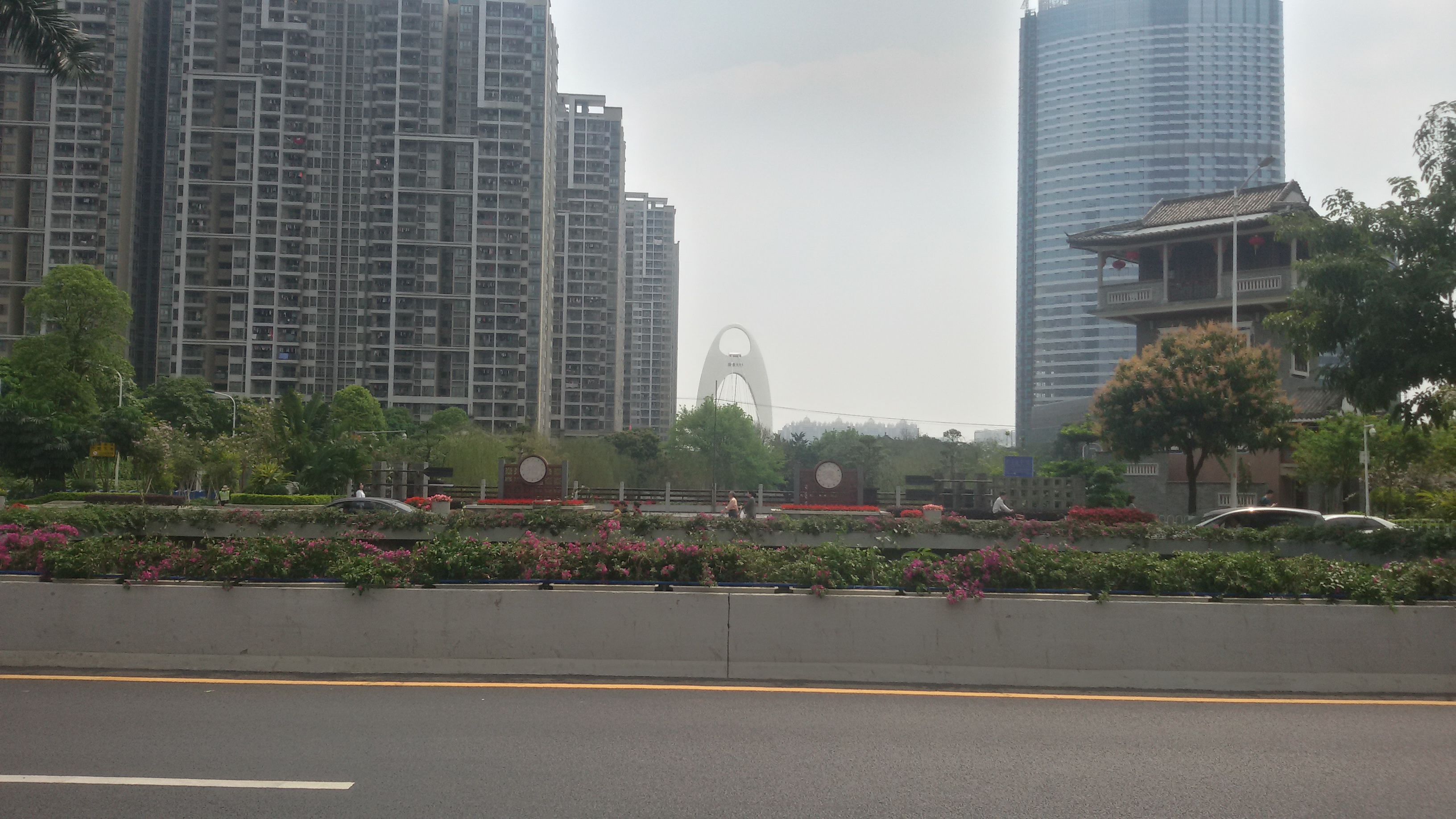 粵語: 獵德村北紀念石